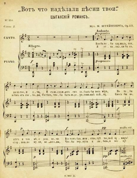 Романс Штейнберга «Вот, что наделали песни твои!» (1903 год, оp.121) - ноты издательства Давингоф (1904) стр.1